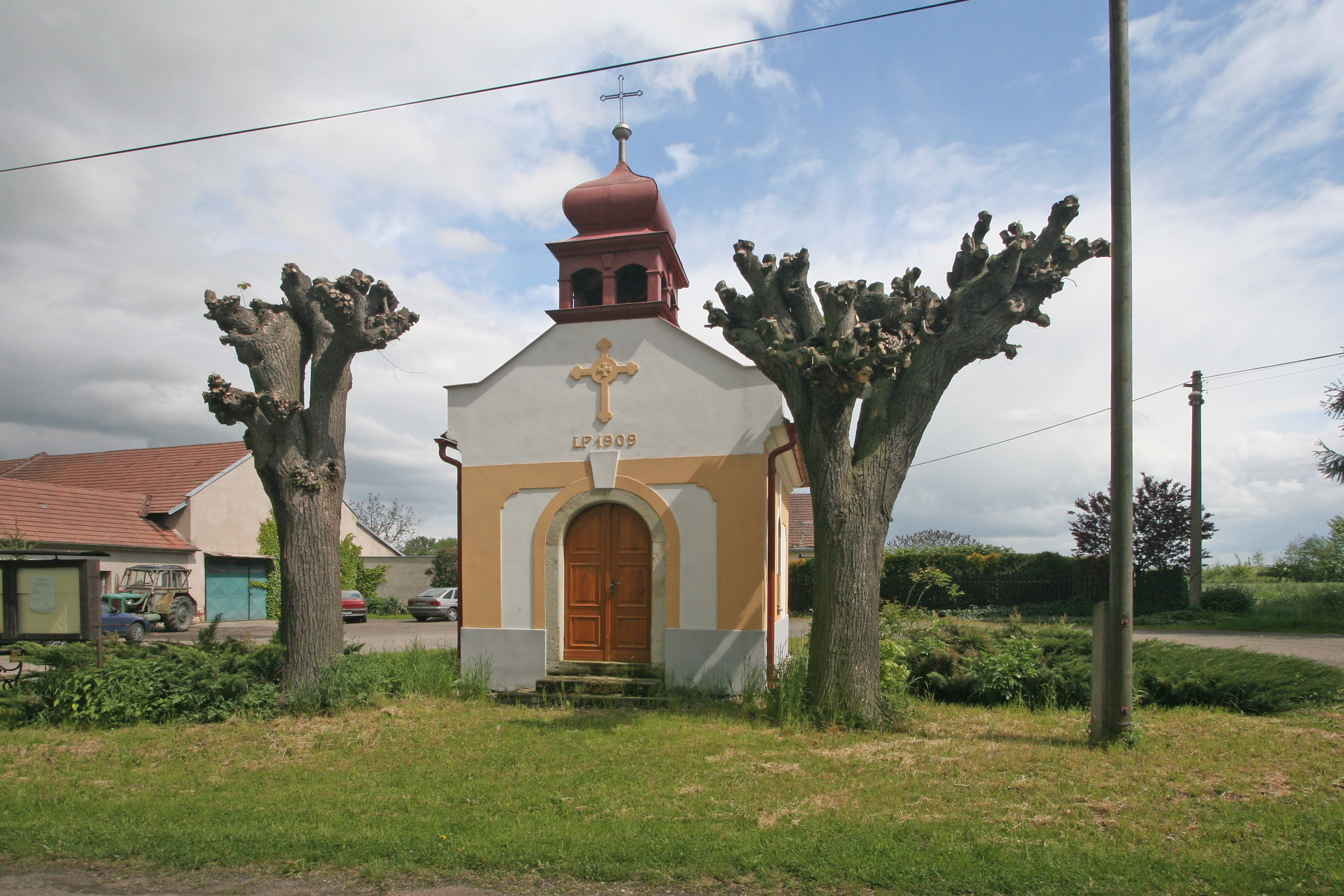 Blansko kaple